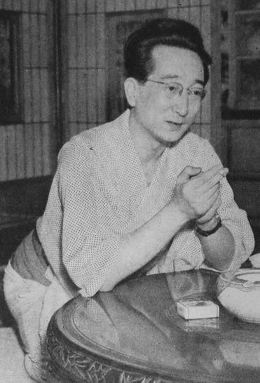 大林清